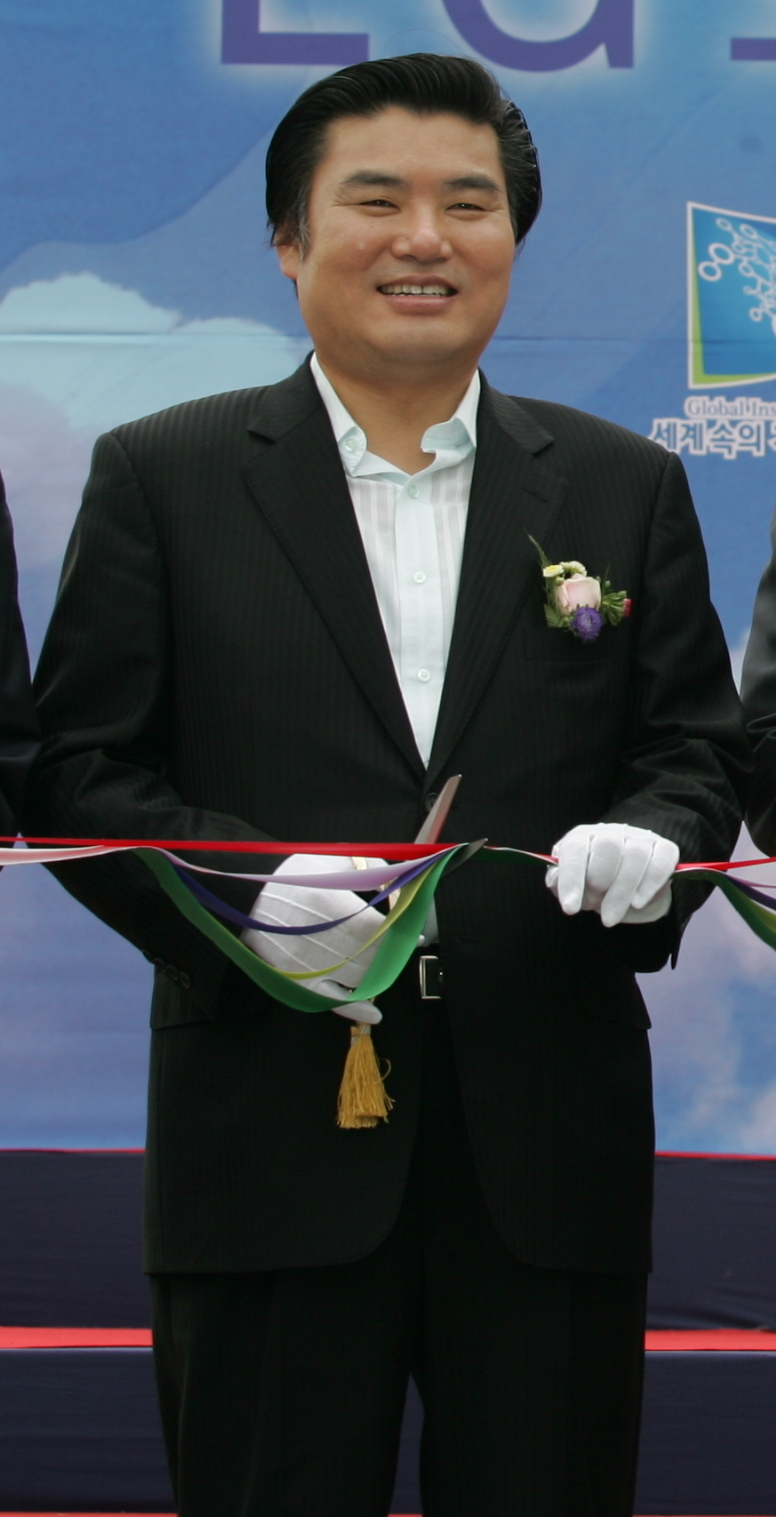 경기도와 평택시는 15일 지역 경제 발전에 대한 Lg전자의 공로를 인정해 이날 완공한 평택시 진위면 소재 Lg전자 평택 디지털파크 인근 산업 도로를 ‘Lg로’로 공식 명명했다. 사진은 안민석 오산시 국회의원, 원유철 평택시 국회의원, 강신익 Lg전자 사장, 김문수 경기도지사, 김선기 평택시장(사진 왼쪽부터)이 테이프 커팅하는 장면.